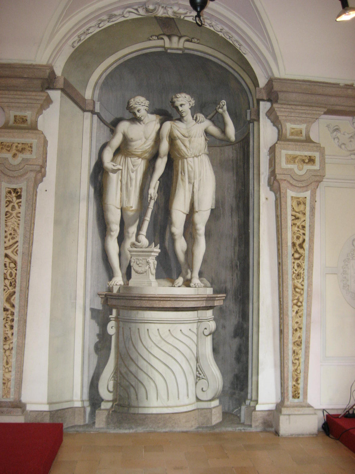 Castello di Belgioioso, trompe l'oeil